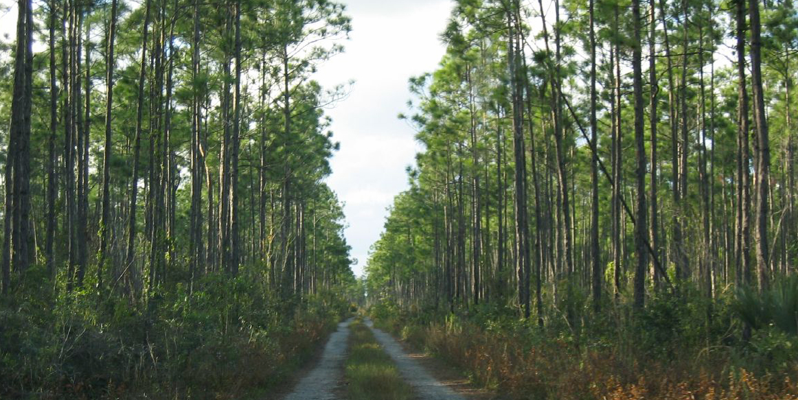 Pinus caribaea var. bahamensis forest. Bahamas.